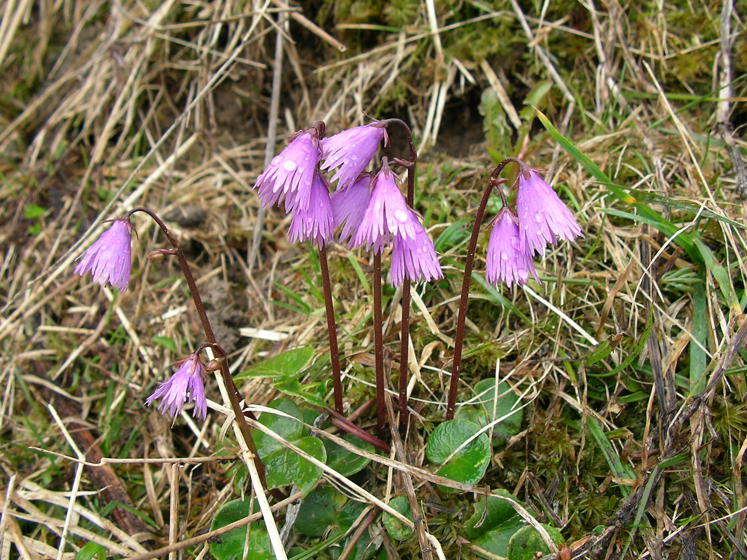 Soldanella alpina, Gindelalm, Alps, Bavaria, Germany